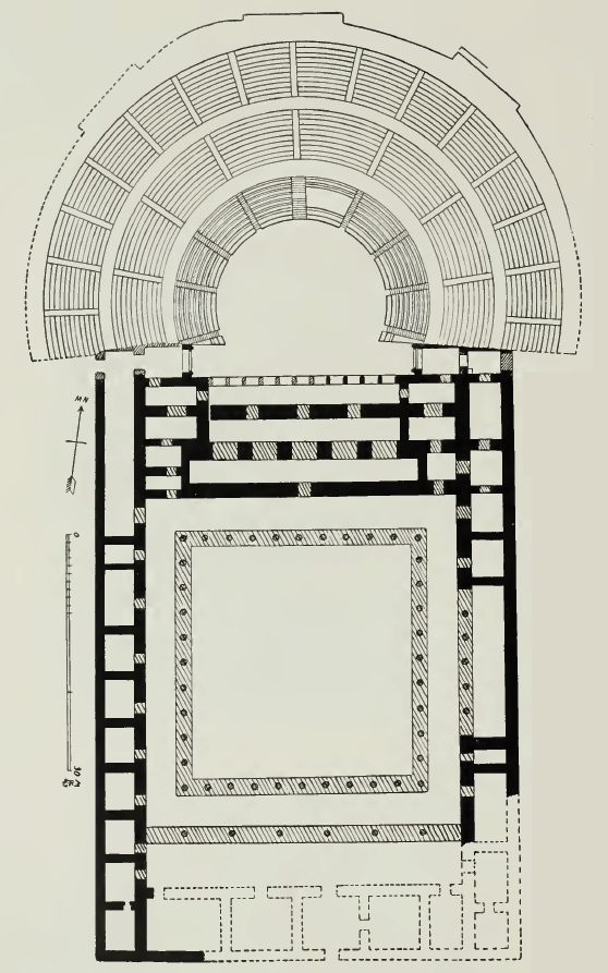 Plan du théâtre hellénistique de Babylone.